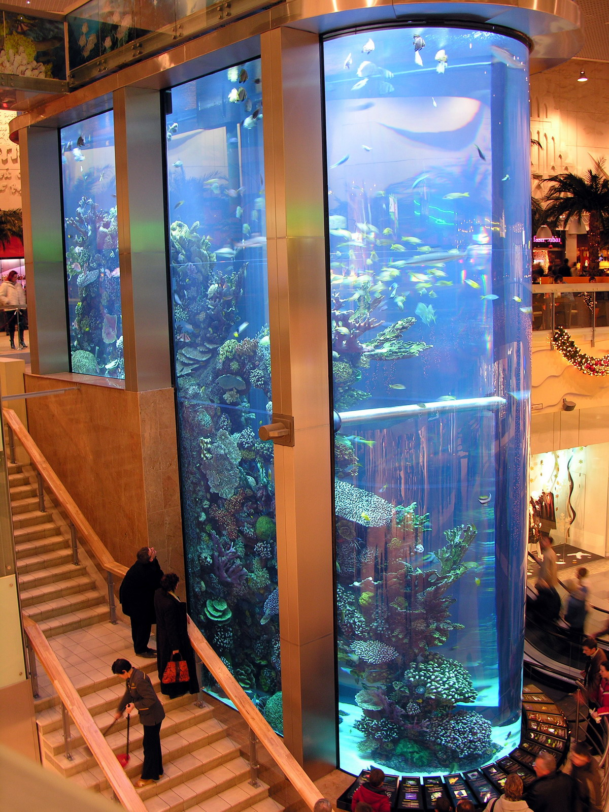 Mega akvariumas, Kaunas.